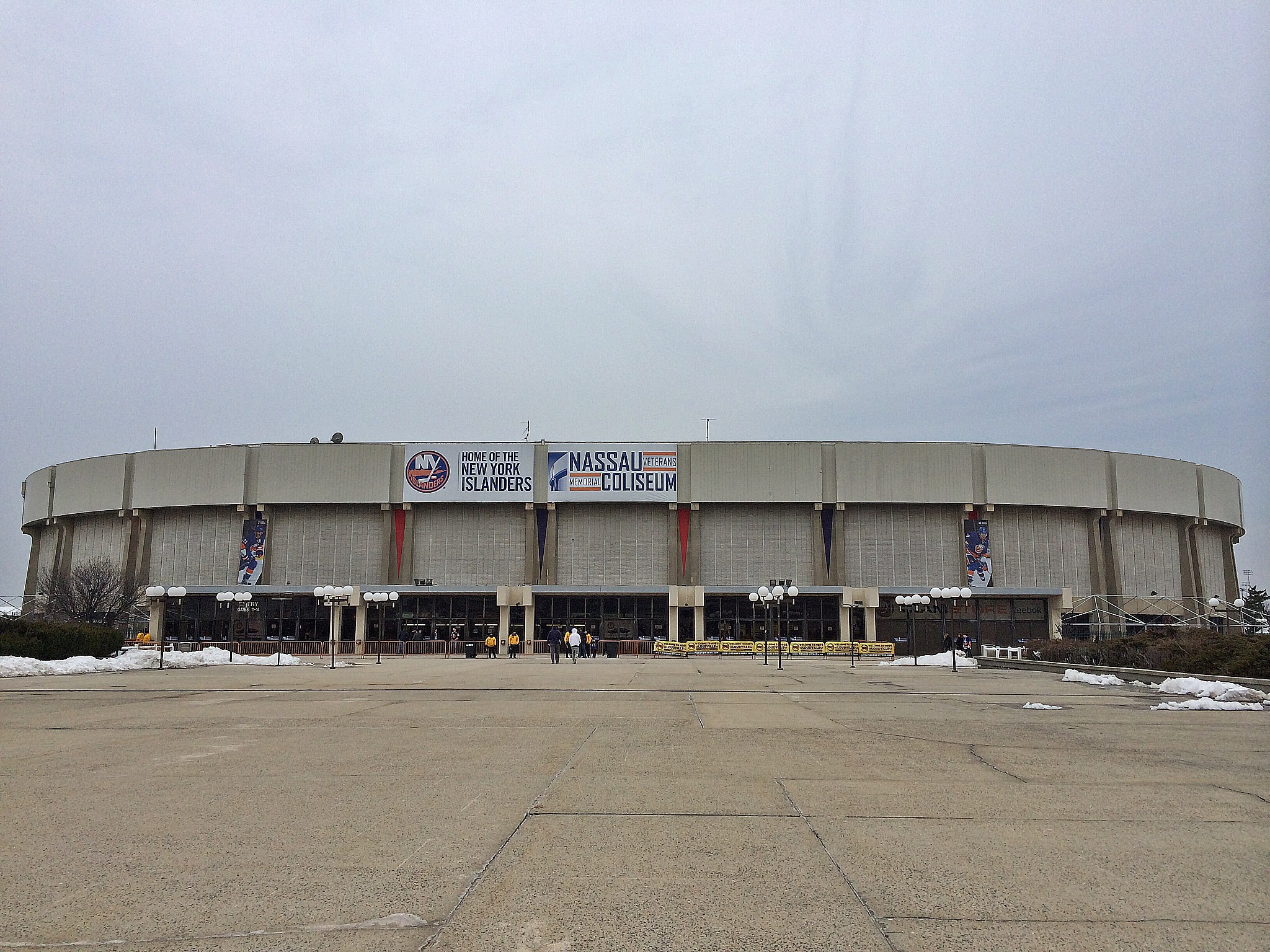 Nassau Coliseum Exterior, March 2014